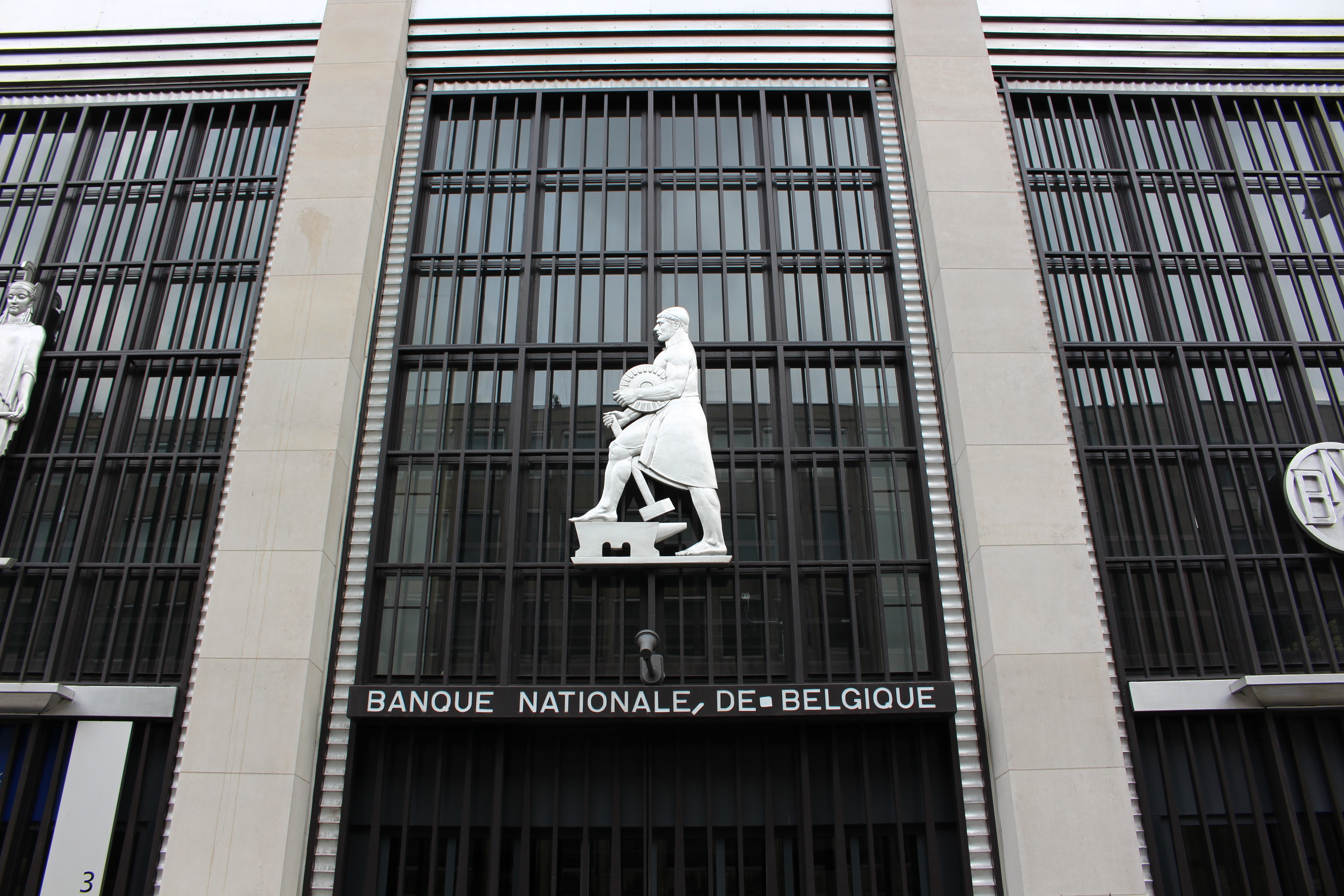 Национальный банк Бельгии (Nationale Bank van België, Banque nationale de Belgique)